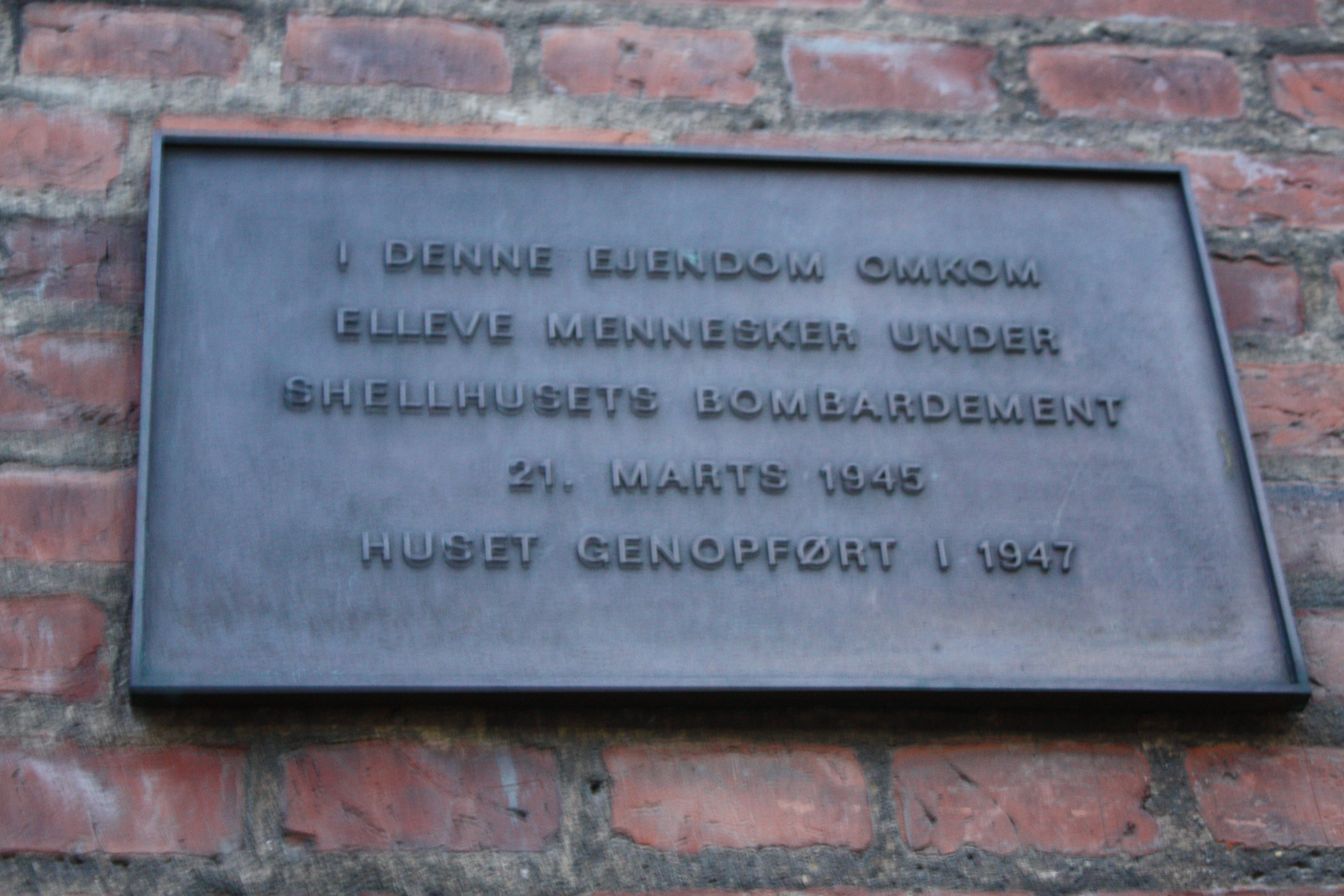 Commemorative plaque on Sønder Boulevard 106 in Copenhagen, Denmark